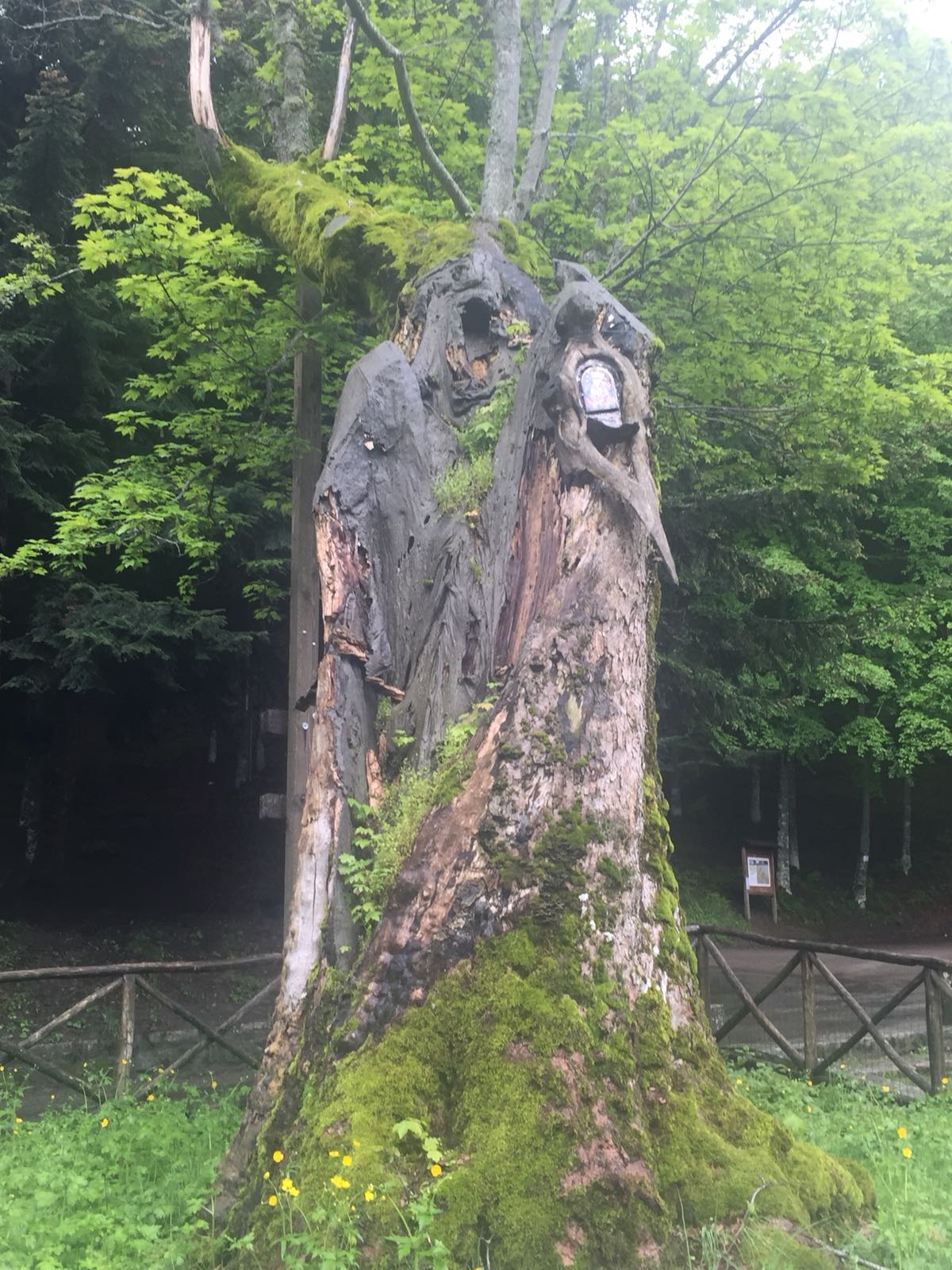 Sacred Nature in the santuario della madonna dell'acero